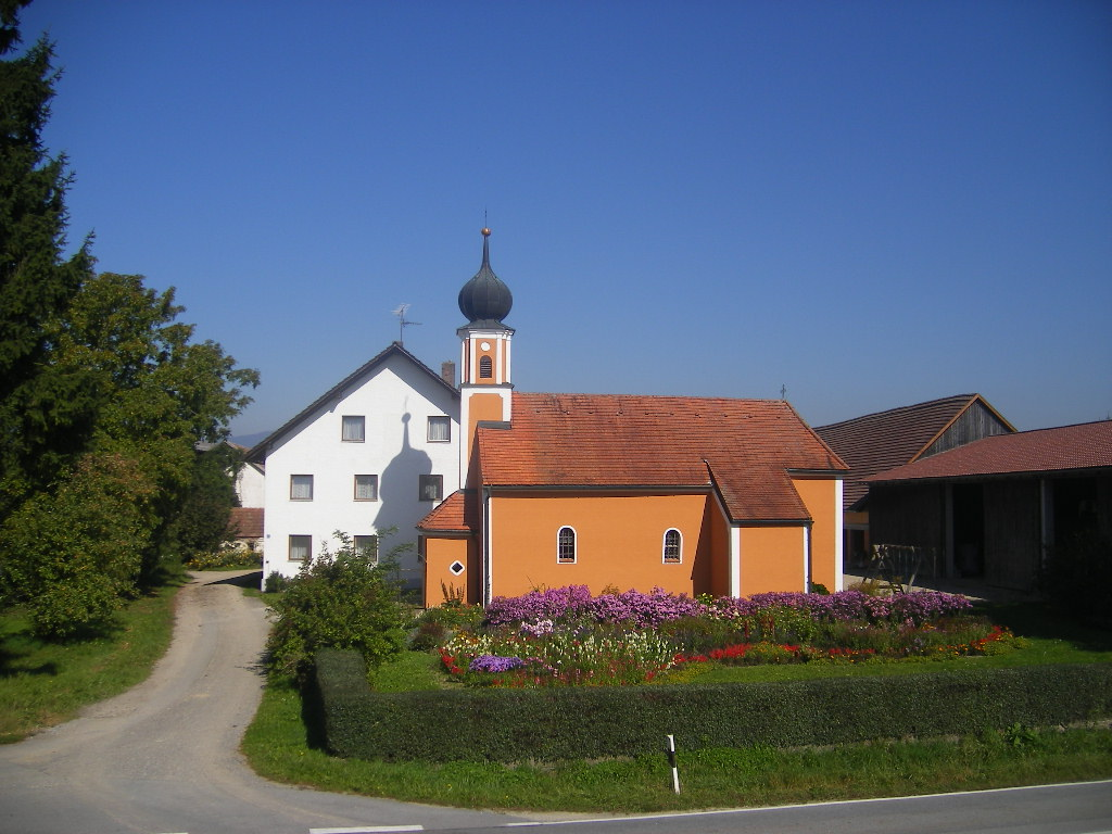 Kleinschwarzach (Offenberg municipality)